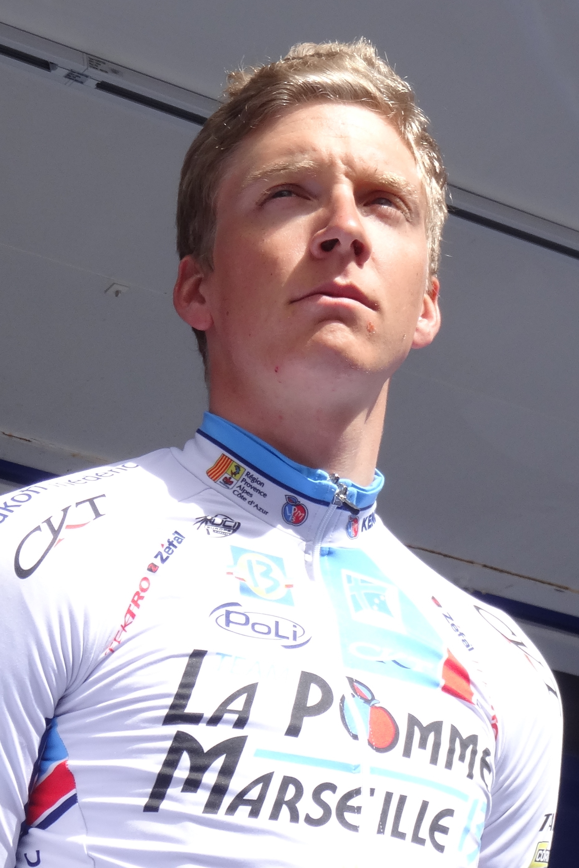 Reportage photographique réalisé le mercredi 7 mai 2014 au départ de la première étape de l'édition 2014 des Quatre jours de Dunkerque à Dunkerque, Nord, Nord-Pas-de-Calais, France. Depicted person: Clément Saint-Martin Depicted team: La Pomme Marseille 13